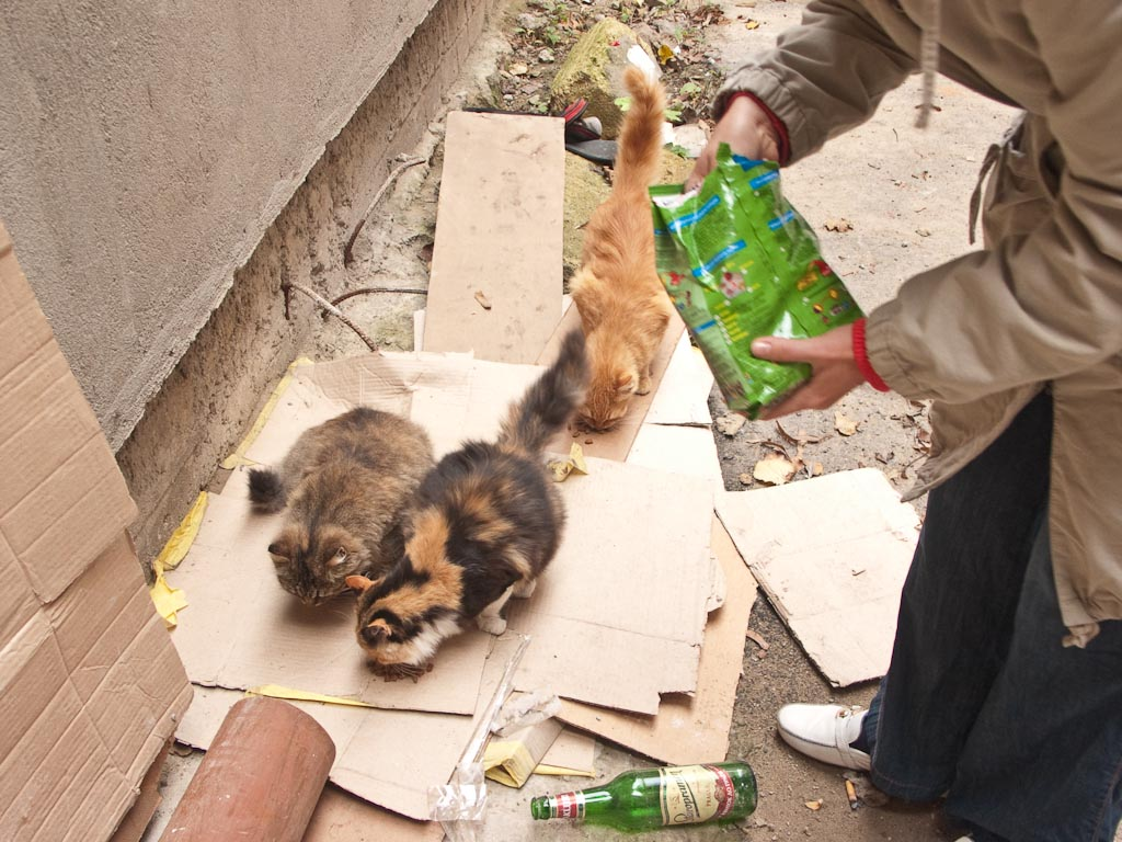 Украина (Україна): обл.Одесская (обл.Одеська): Одесса (Одеса): р-н Приморский: ул.Лейтенанта Шмидта,25: кошки; 10:13 04.11.2008